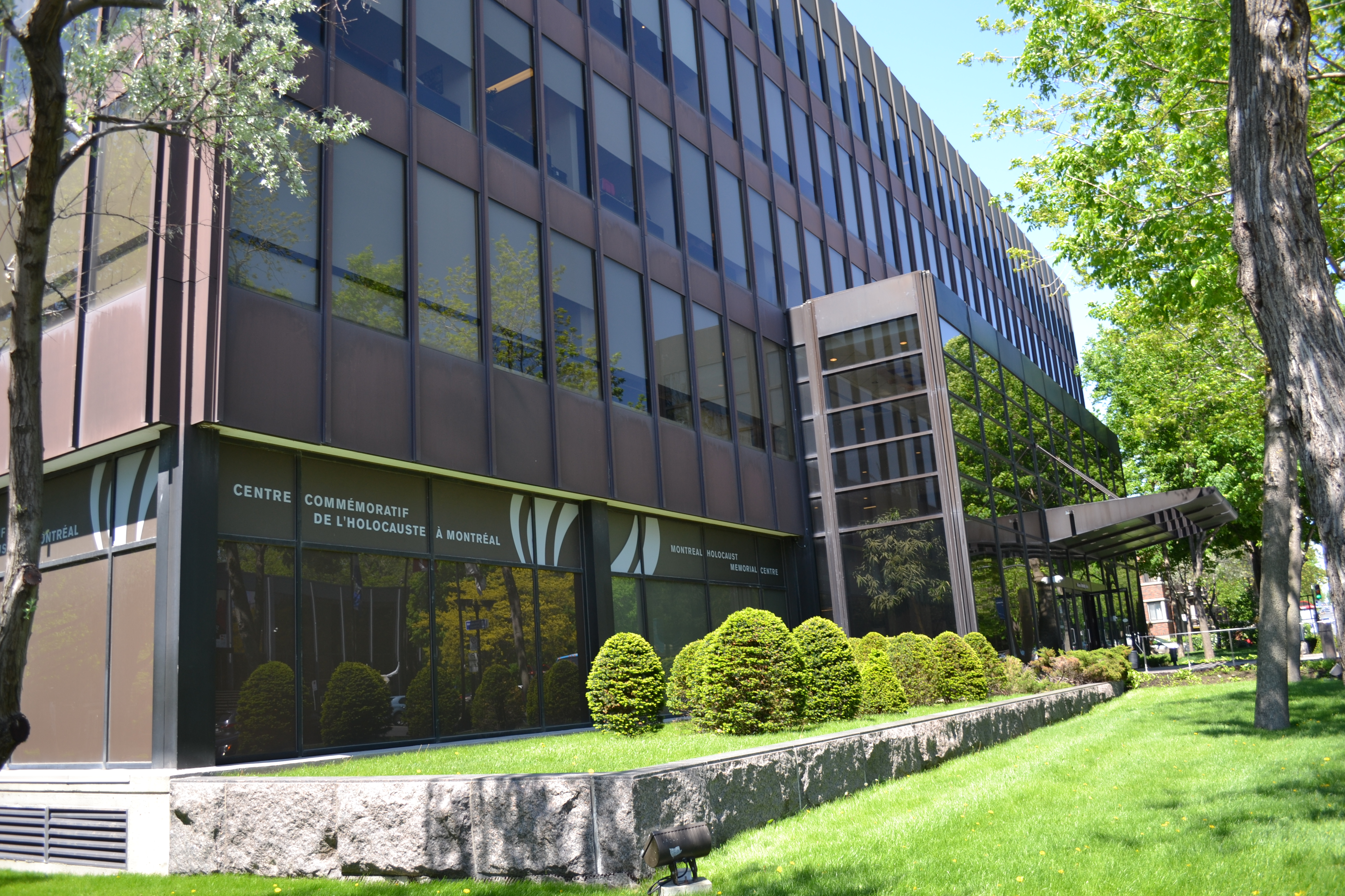 Photo de la devanture du bâtiment Cunnings